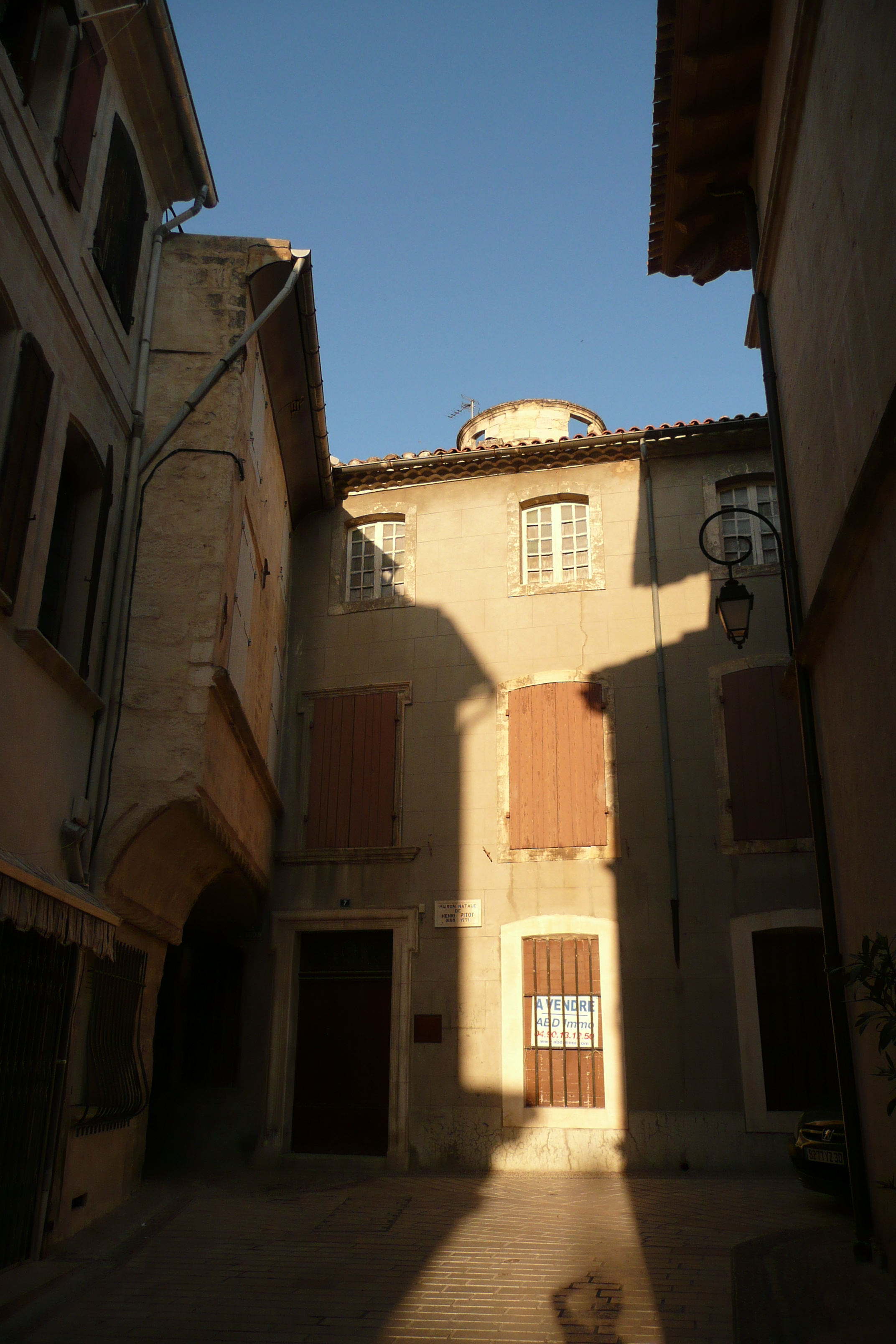 Maison natale de Henri Pitot 1695-1771 en Aramon.